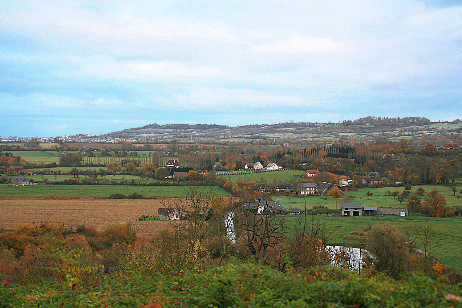 vue de Brucourt à partir de la colline Saint-Laurent vers le nord en direction de la Croix Kerpin